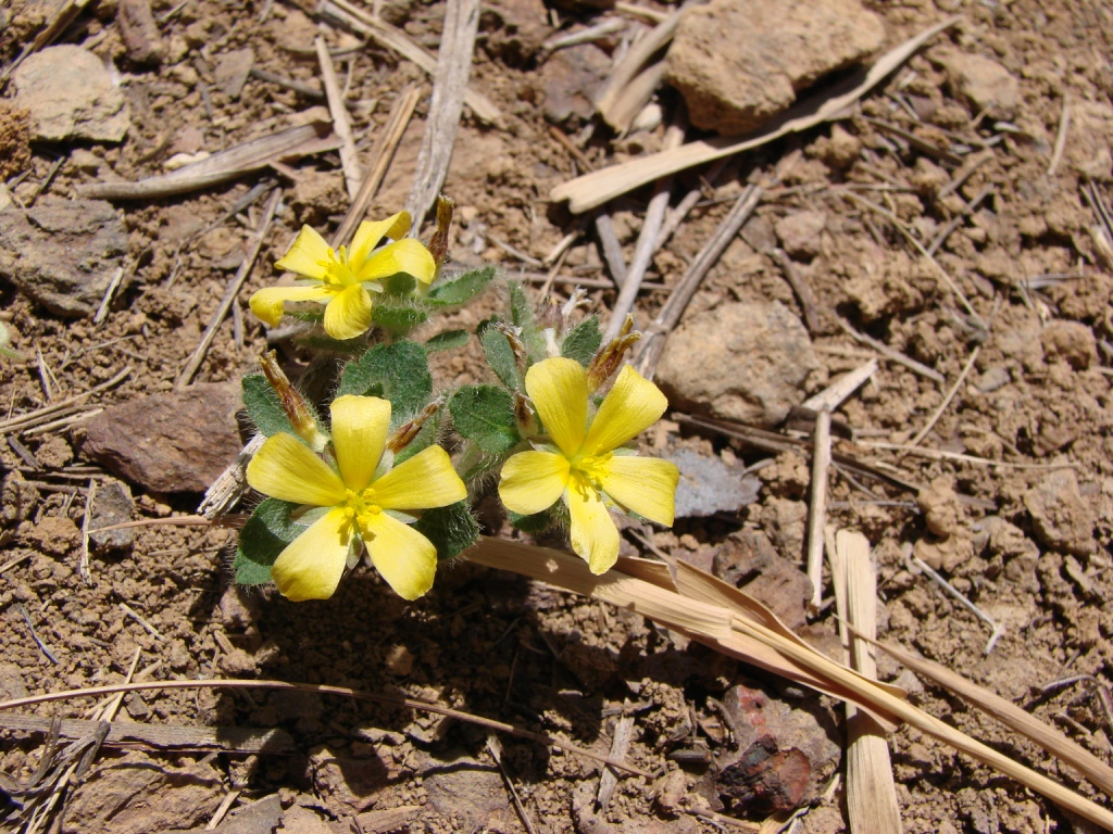 Turnera opifera Mart. - Sin. het. Turnera nana - TURNERACEAE - APA da Bacia do Rio São Bartolomeu - Brasília - Distrito Federal - Brasil.